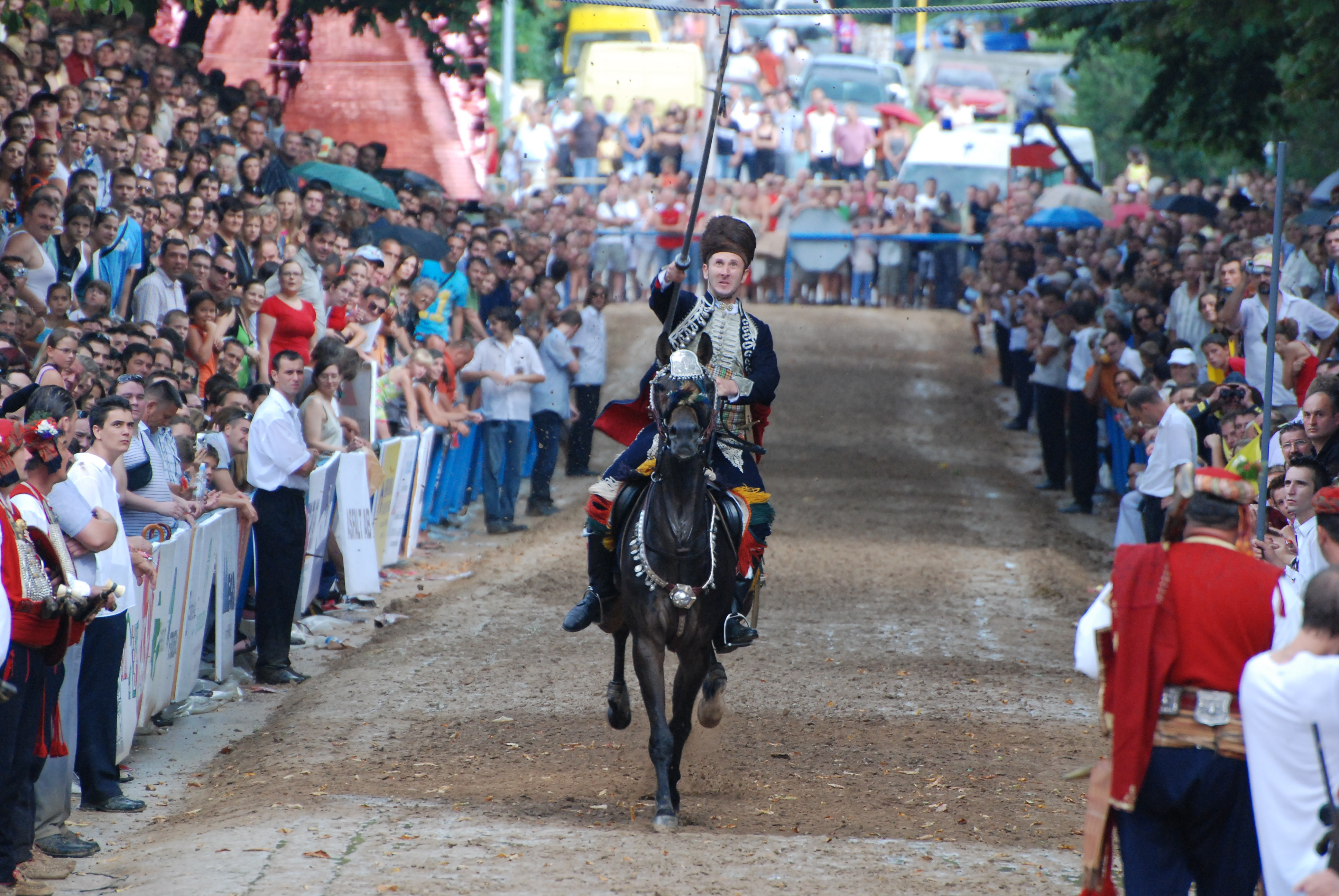 Alkar gađa u metu.